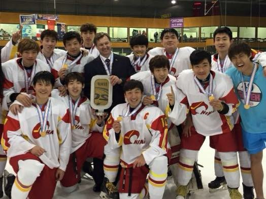 Победитель 2015 UNDER-20 ICE HOCKEY WORLD CHAMPIONSHIP DIVISION III WINNERS, TEAM CHINA